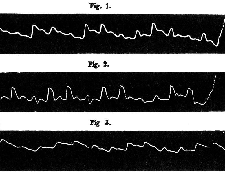 Von Kußmaul 1873 sphygmographisch aufgezeichnete Pulskurven: Fig. 1, 2 stammen von Fall 2, Fig. 3 von Fall 3 der Erstveröffentlichung: „Aus diesen Zeichnungen erhellt sich, dass der Puls in der Wirklichkeit nie ganz verschwand, auch wenn er für den tastenden Finger nicht mehr zu existiren schien, war er in freilich verkümmerter Gestalt noch vorhanden.“